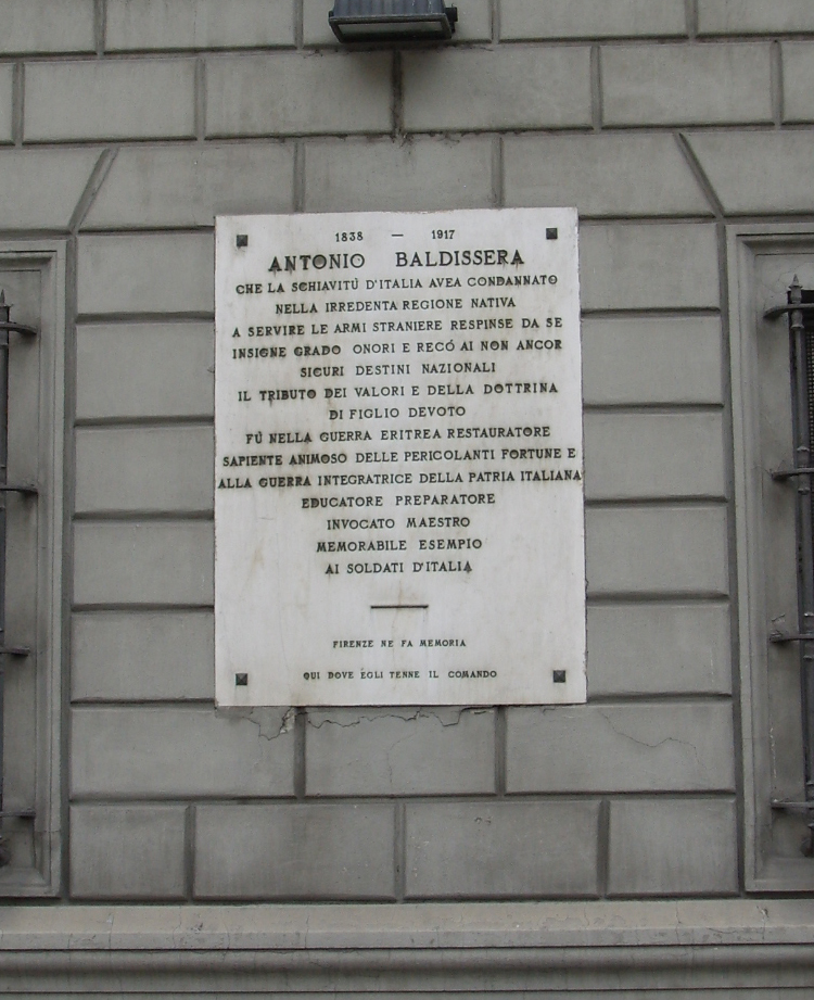 Ex convento di Santa Caterina. Florence, Italy.